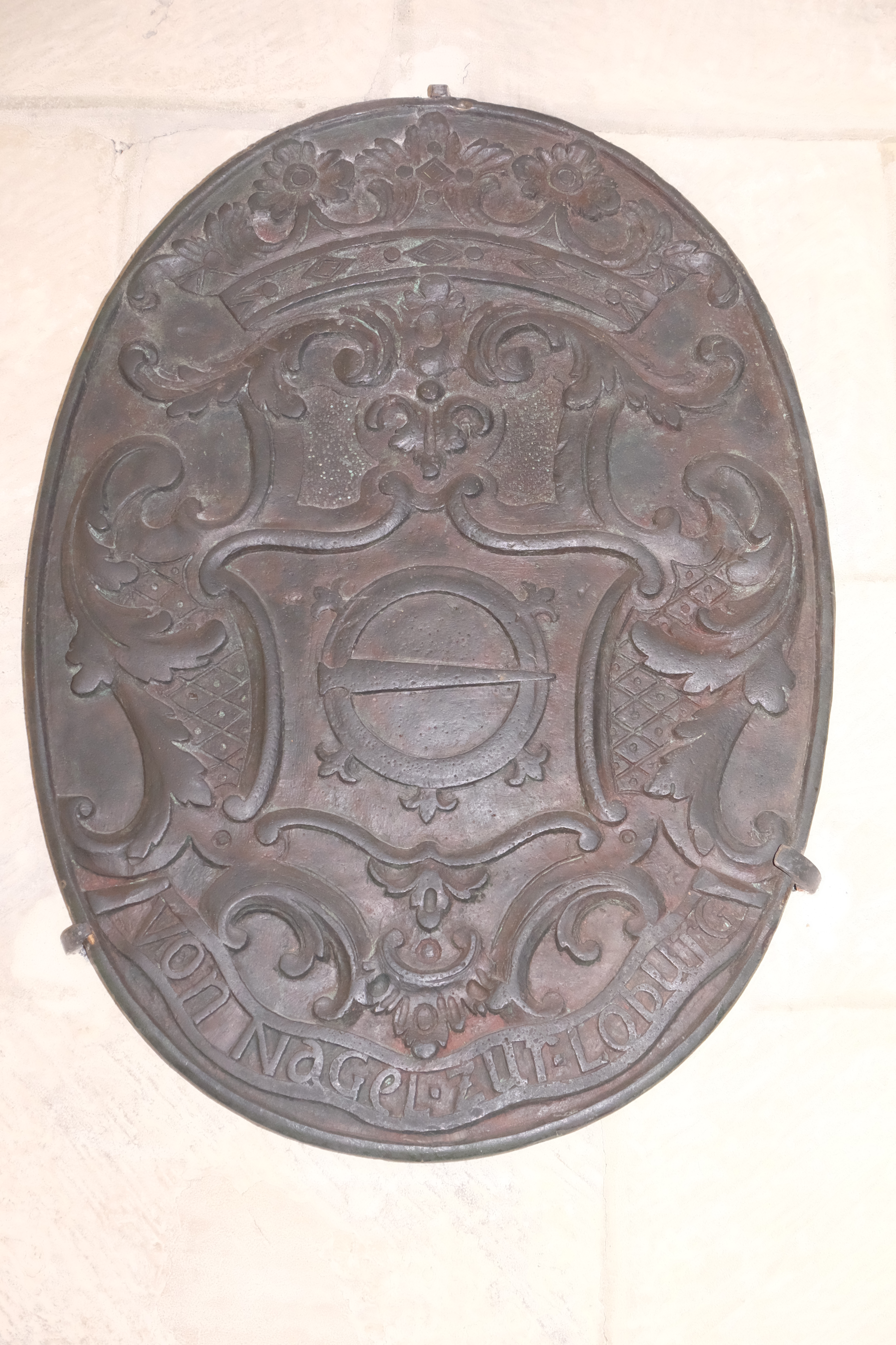 Wappen der Domherrn in Münster